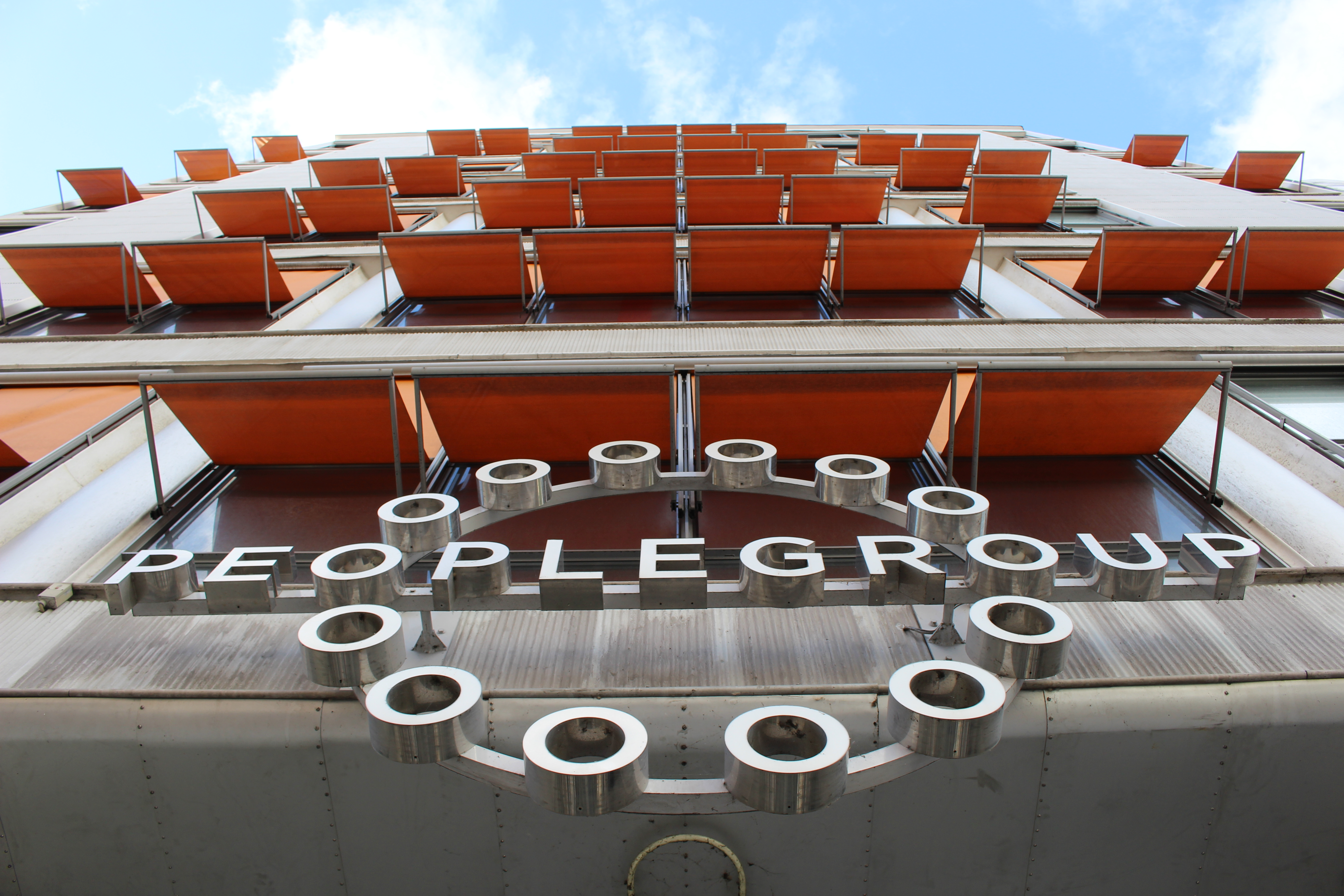 PeopleGroup's bygning på Vester Farimagsgade.